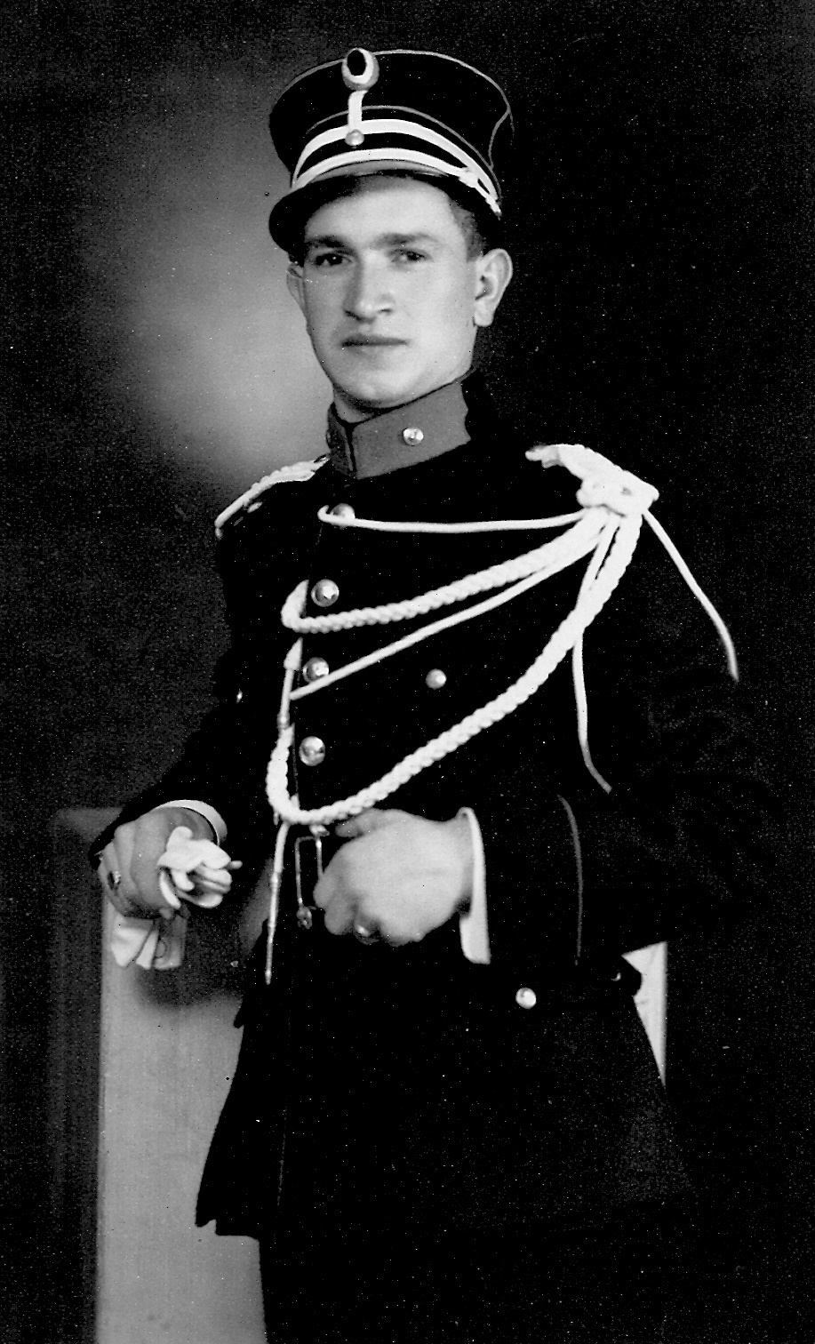 Rijkswachter in 1947, gescande foto uit mijn eigen collectie